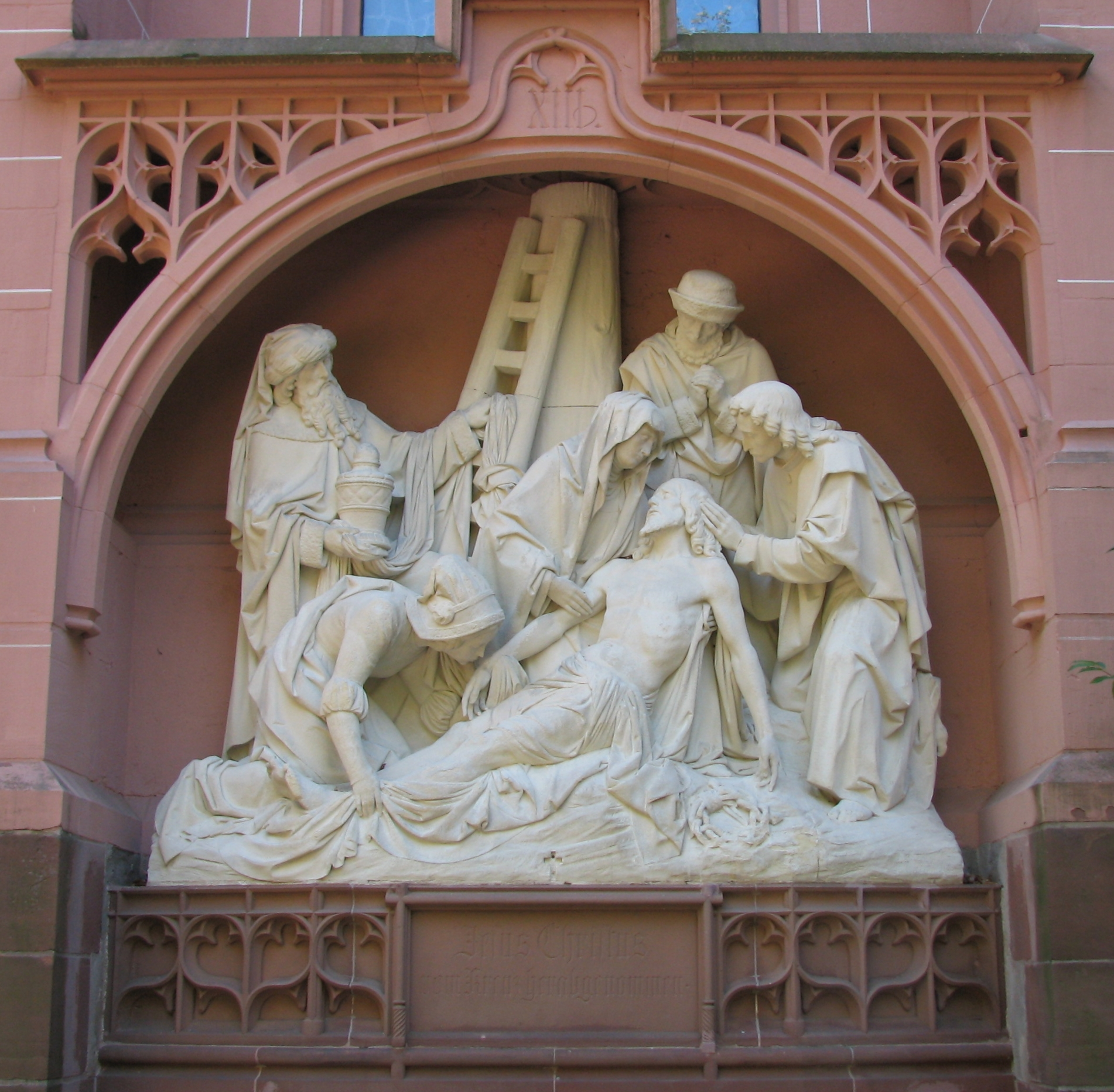 St. Rochus chapel, Bingen, Germany; Christus vom Kreuz herabgenommen